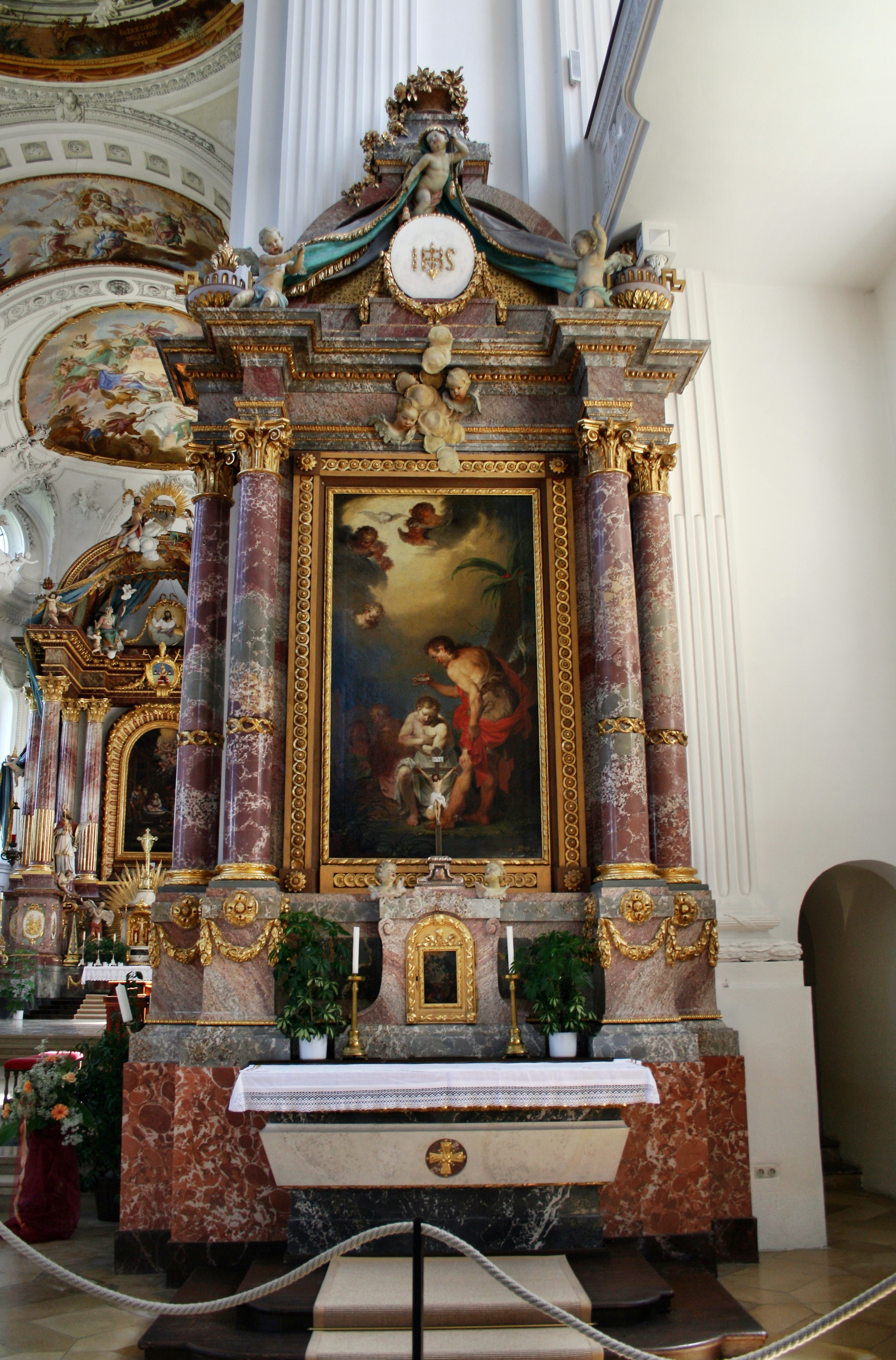 St Verena, Rot an der Rot.